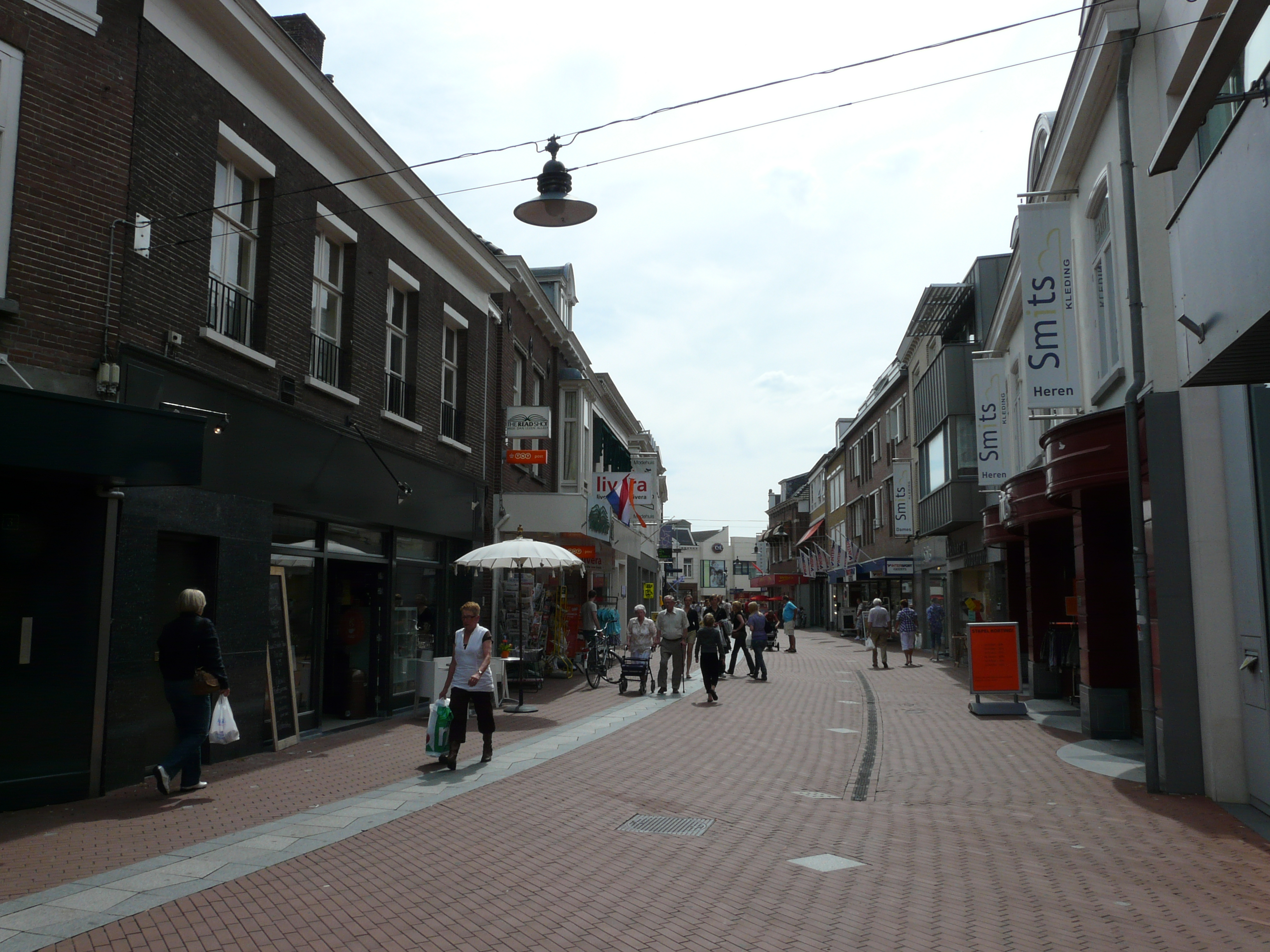 Zicht op een deel van de Kerkstraat in het centrum van Oosterhout